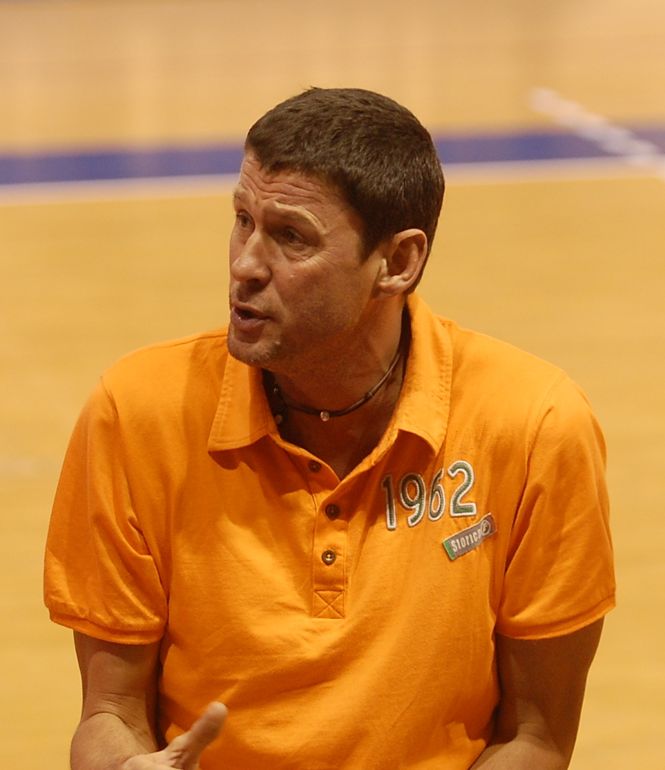 Patrick Duflos, ancien international français de volley-ball. Entraîneur de l'Arago de Sète.